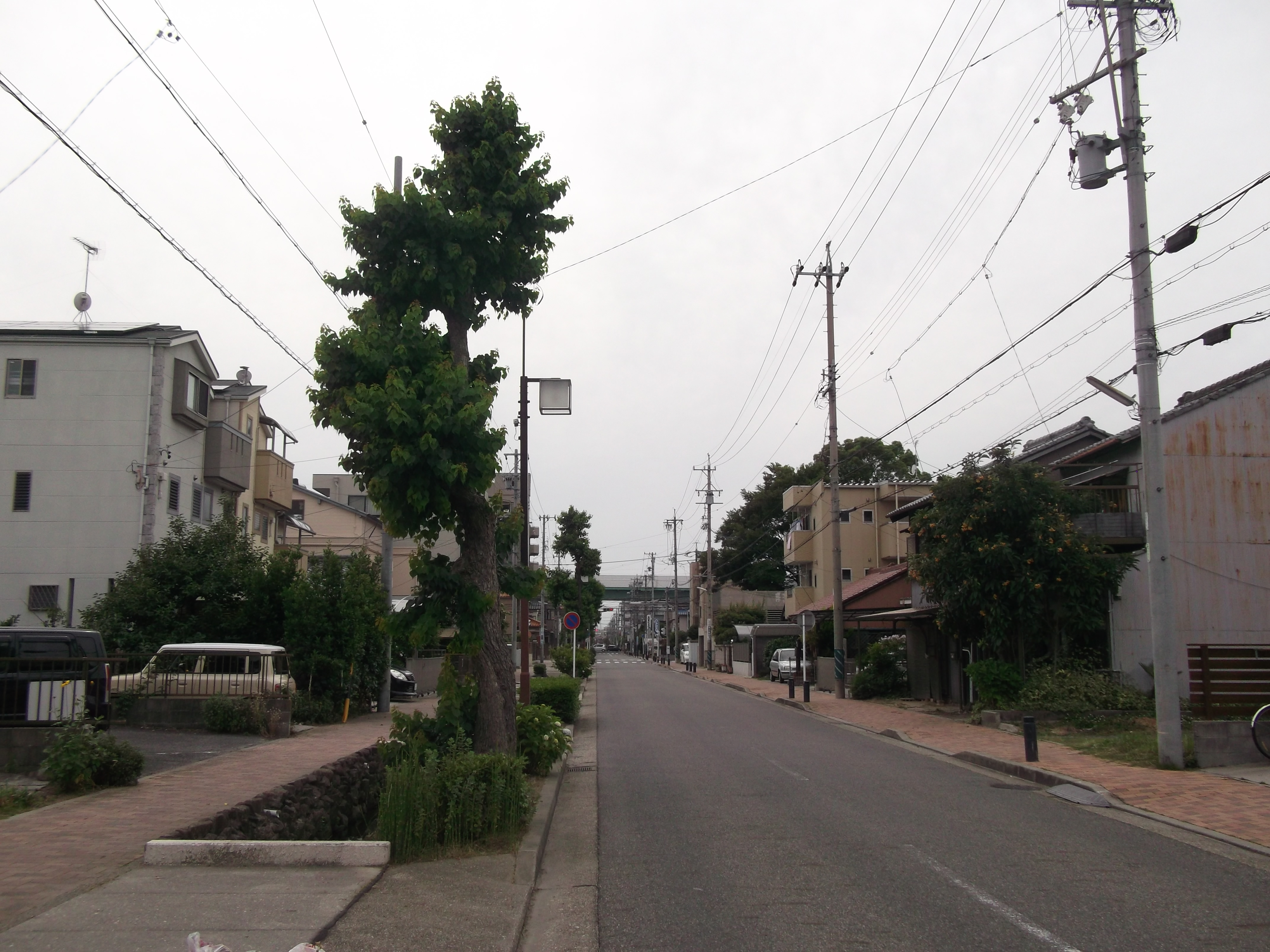 名古屋市北区成願寺の三郷悪水上の道路の様子